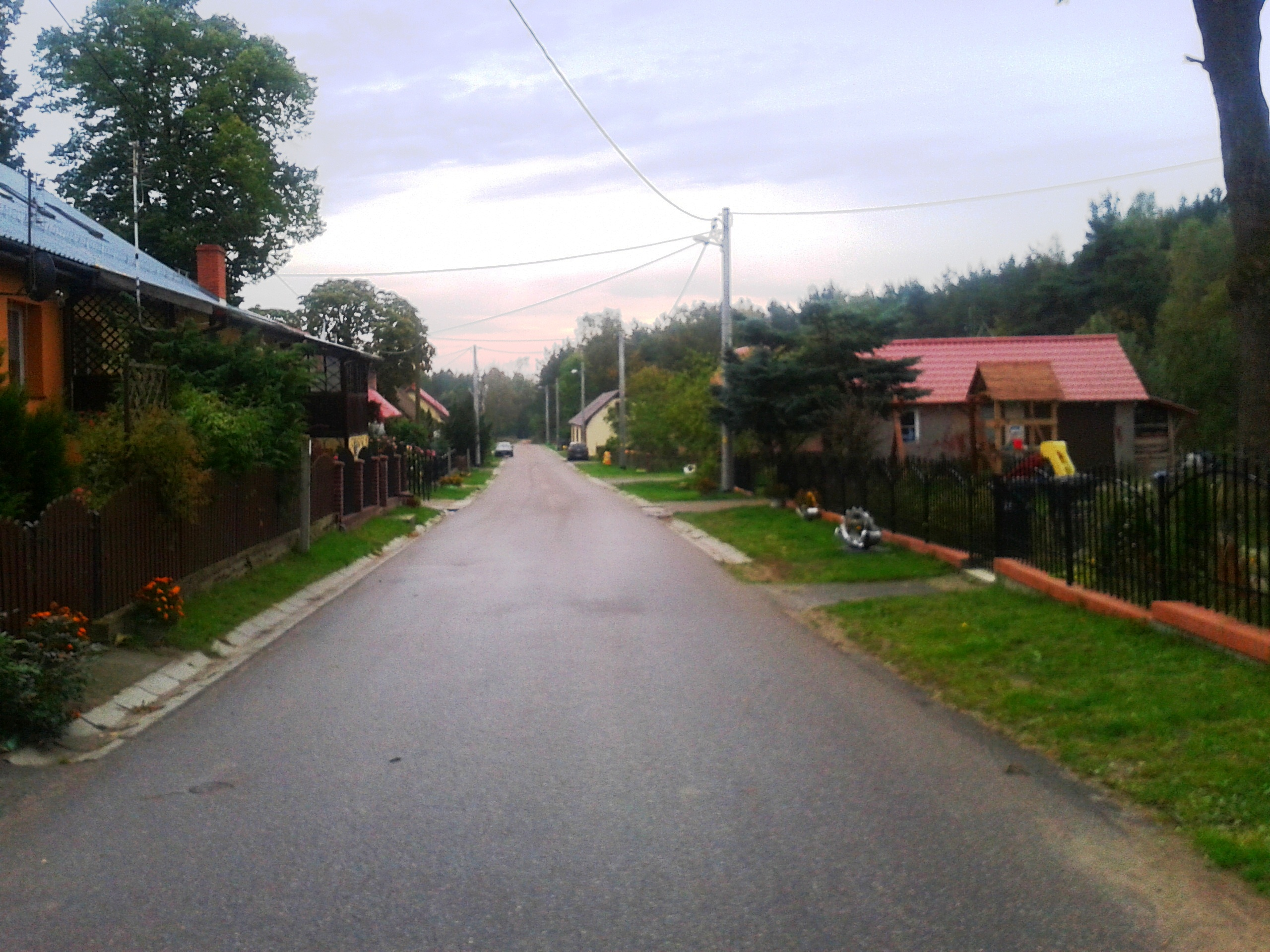 Łobżany - widok na wieś